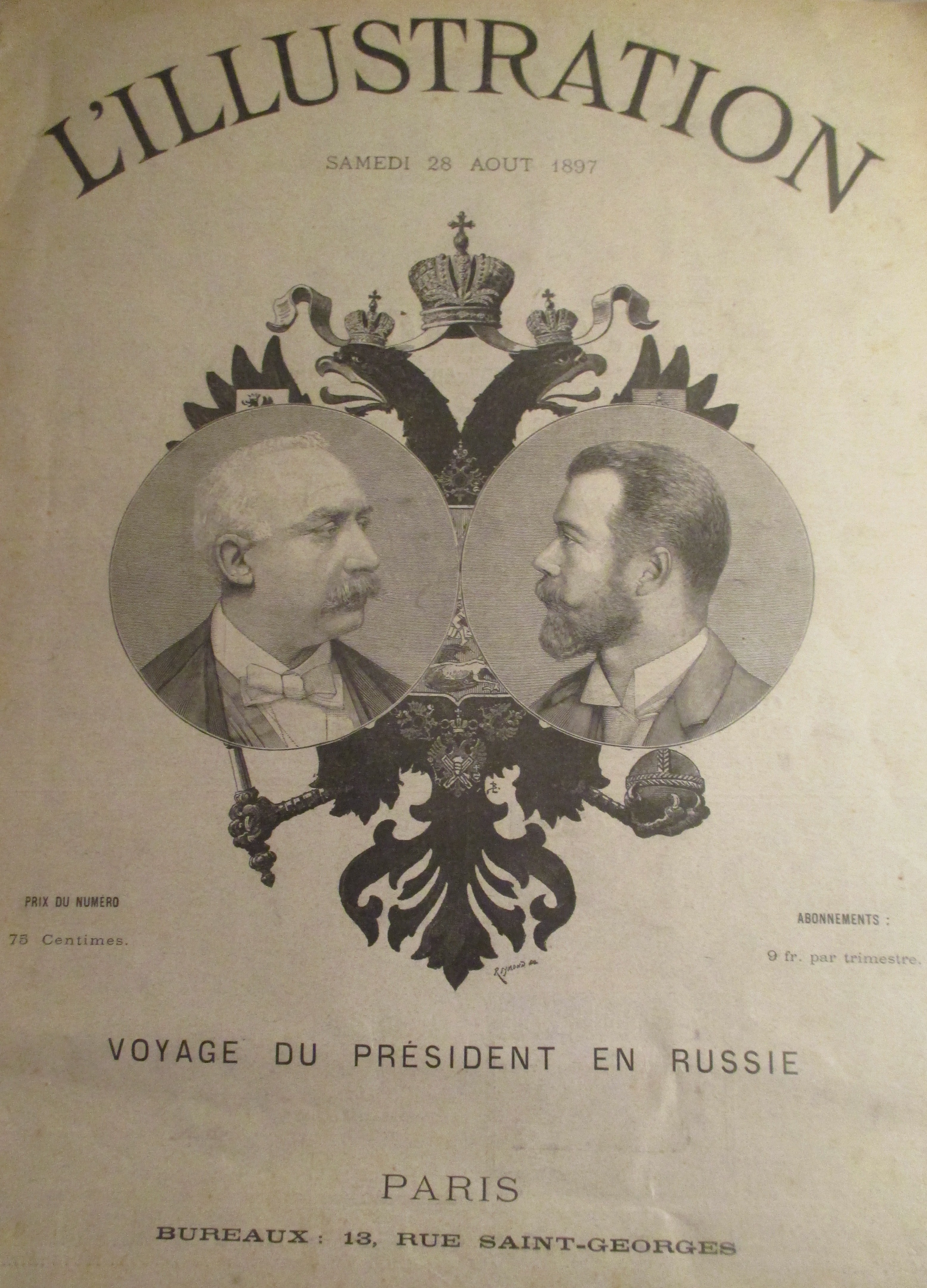 Couverture de l'Illustration du 28 août 1897: Voyage du président de la République en Russie.